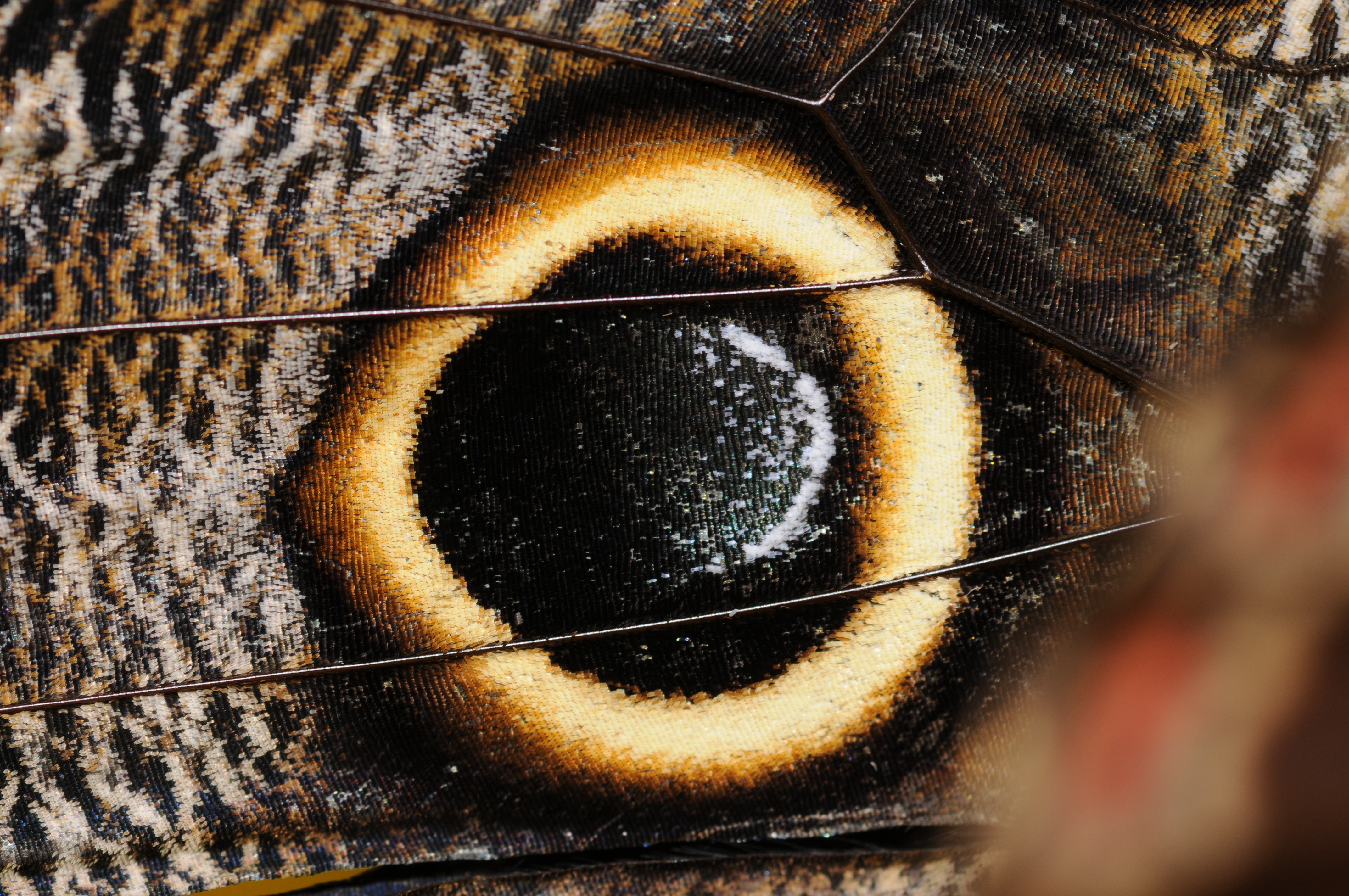 Détail d'une des ocelles d'une des ailes de caligo. Jardin des papillons (Hunawihr).